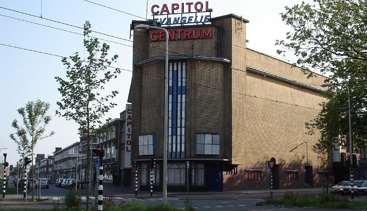 The Blessing Den Haag Church, Loosduinsekade 222, oude bioscoop Capitol, de kerk van David Maasbach, Den Haag, NL